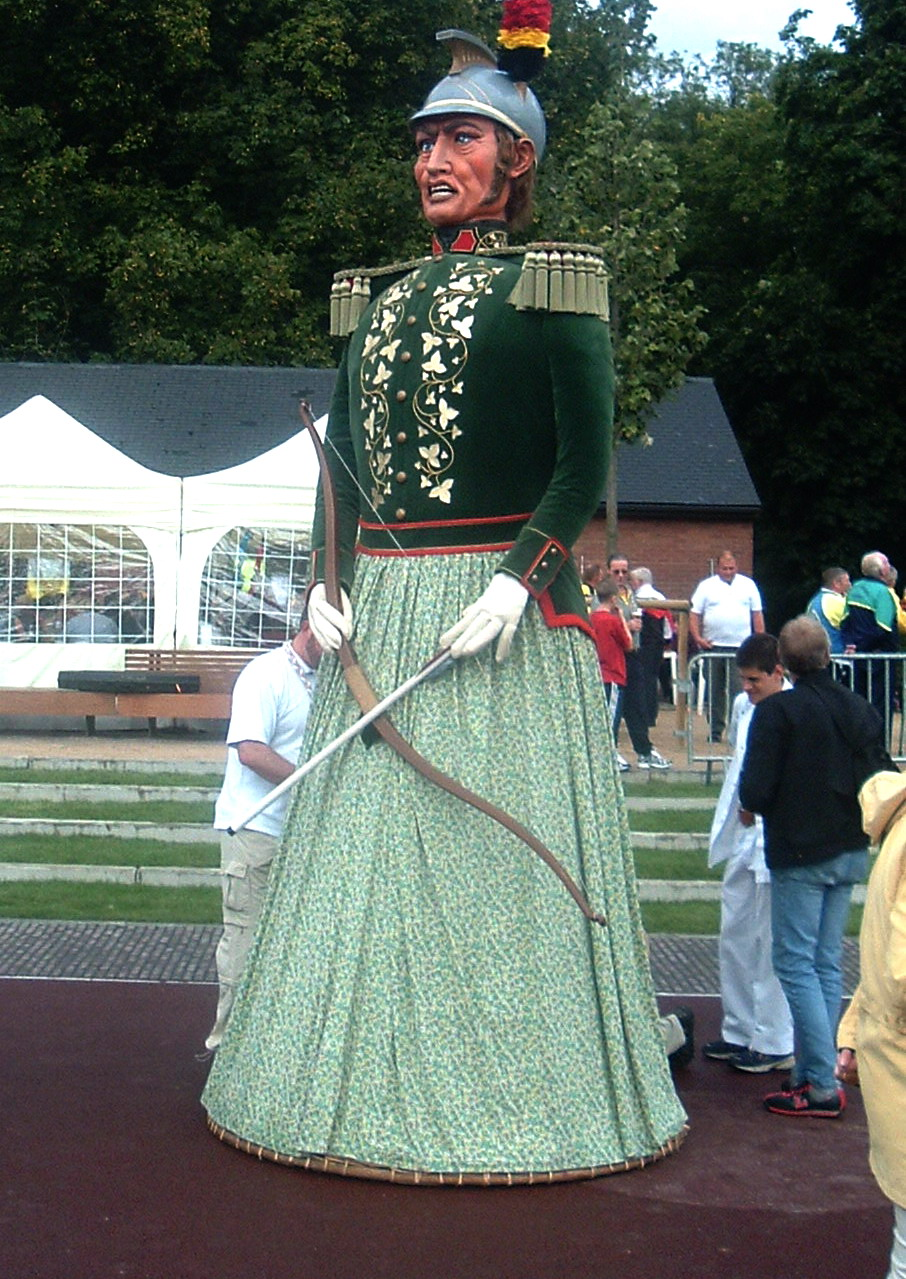 Représentation de Tirant, appelé aujourd'hui Ambiorix.